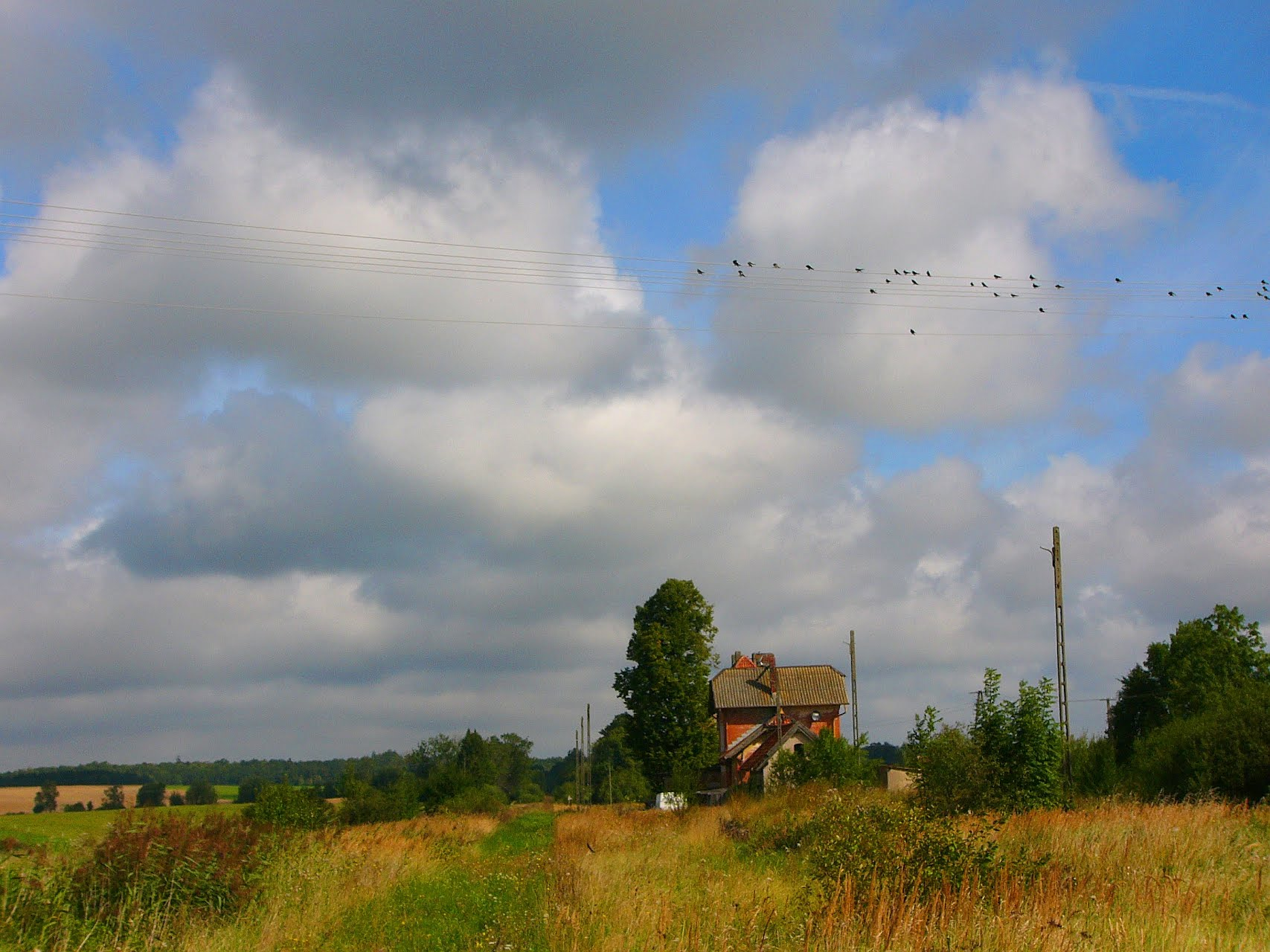 zespół linii kolejowej Kętrzyn - Węgorzewo rampa dworzec dom mieszkalny przepust wodny Radzieje